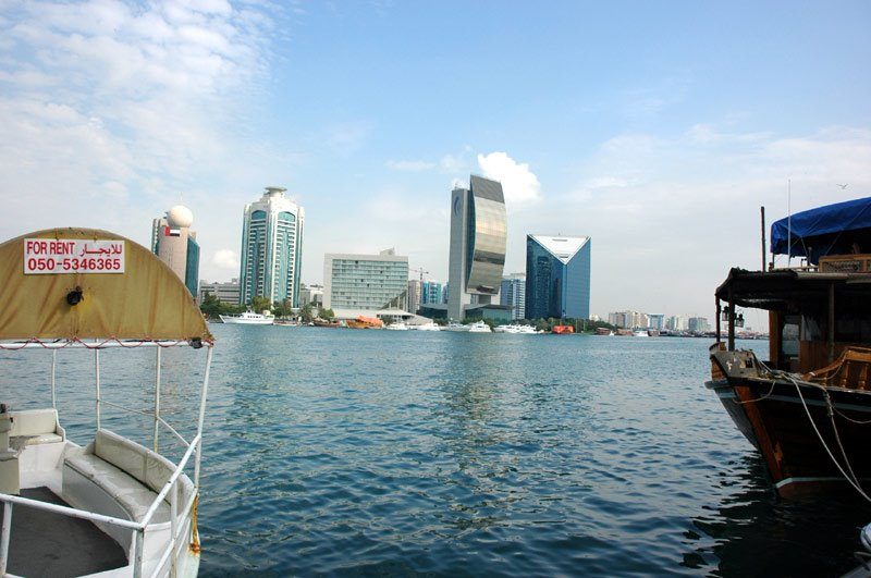 ദുബായ് ക്രീക്ക്